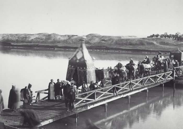 De mahmal, de karavaan met pelgrims op weg naar Mekka, op een brug over het Suezkanaal. Volgens Jacobson (2007: 82) is de fotograaf van dit beeld niet bekend.